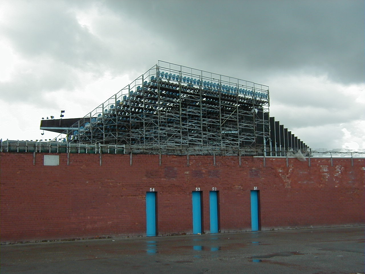 PIC00082